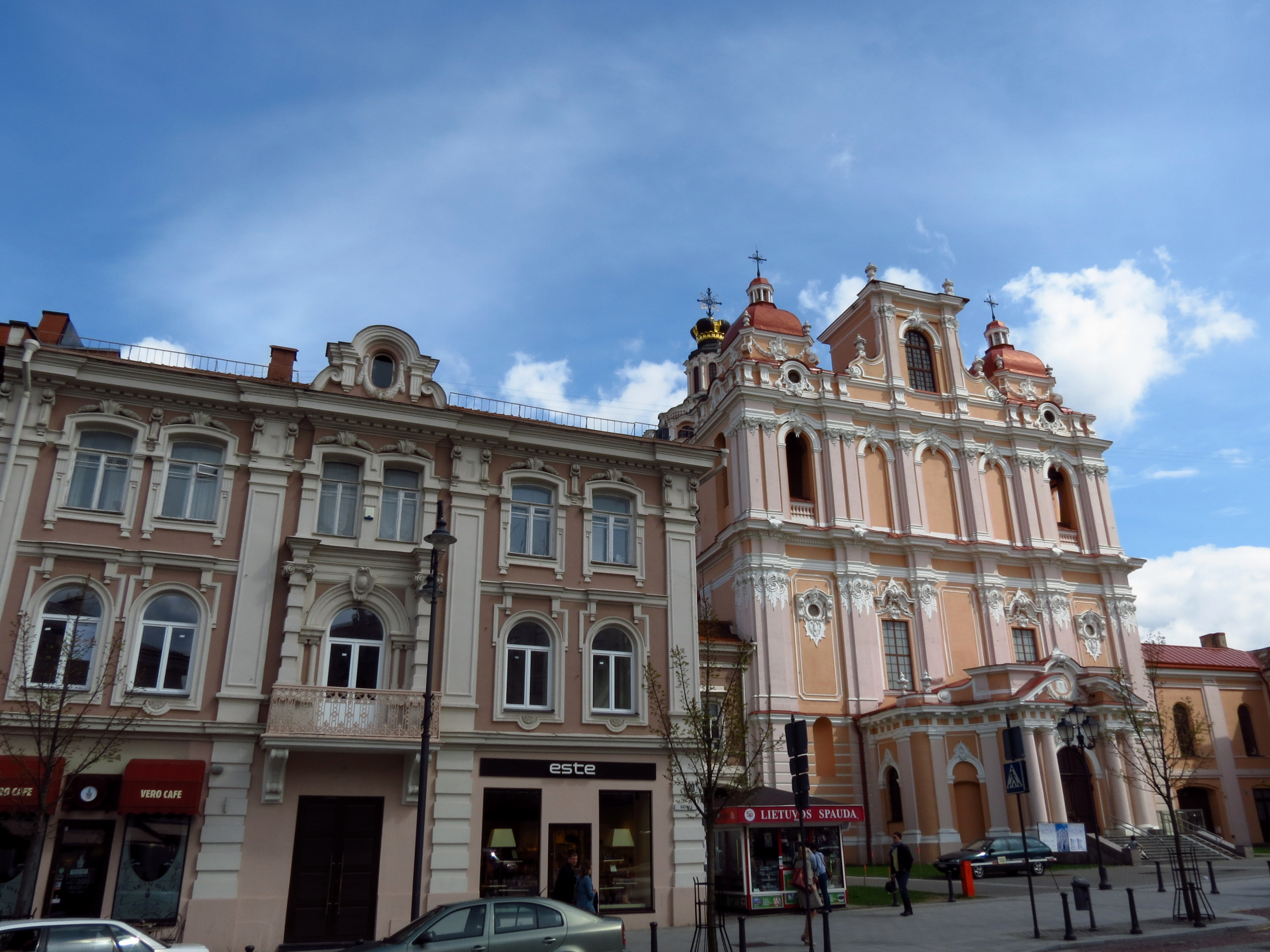 Vue de Vilnius.